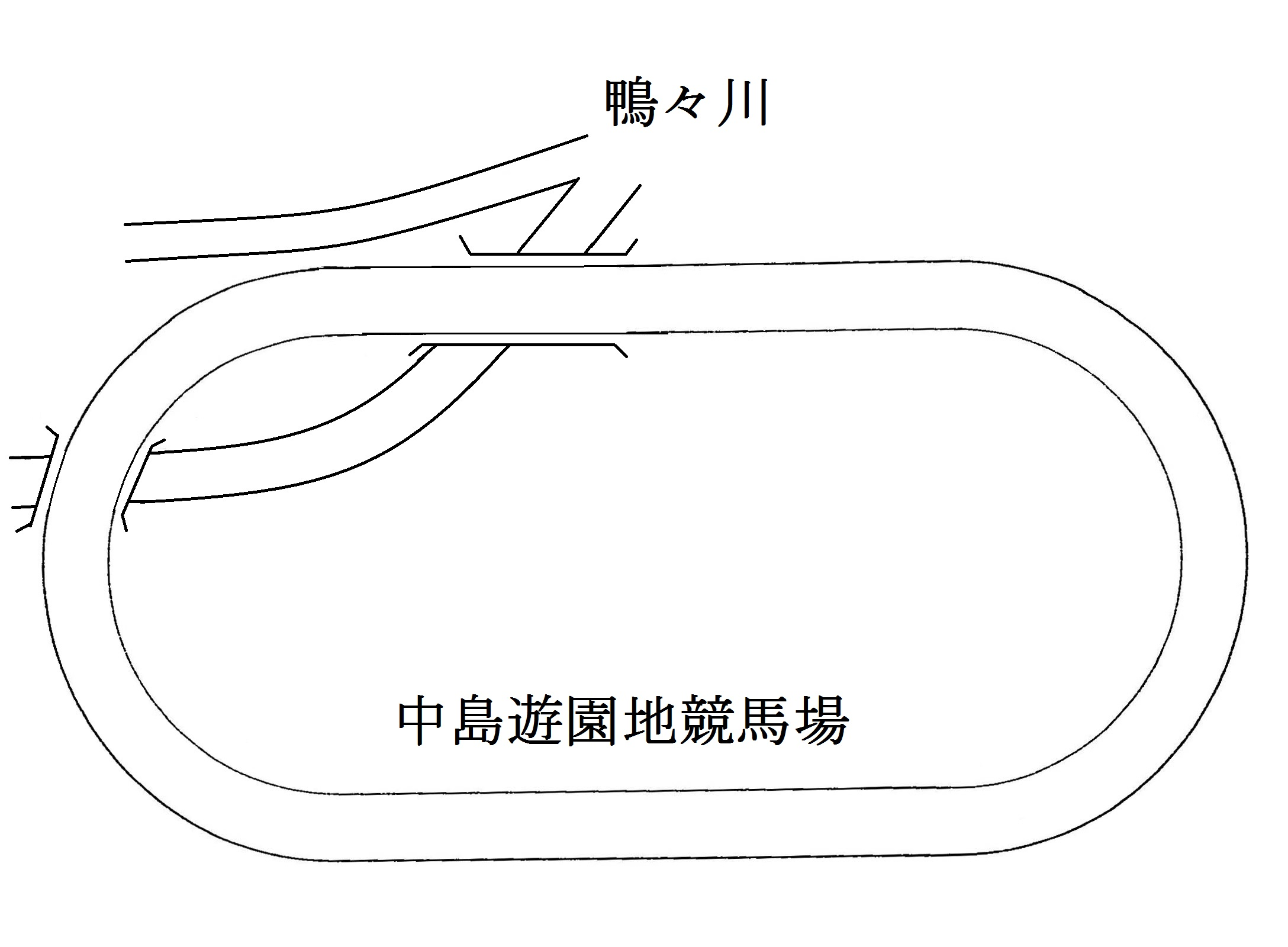 中島遊園地競馬場平面概念図。